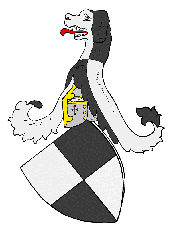 Stammwappen der Hohenzollern